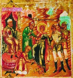 Heilige Bonifatius from Roma (Tarsus)